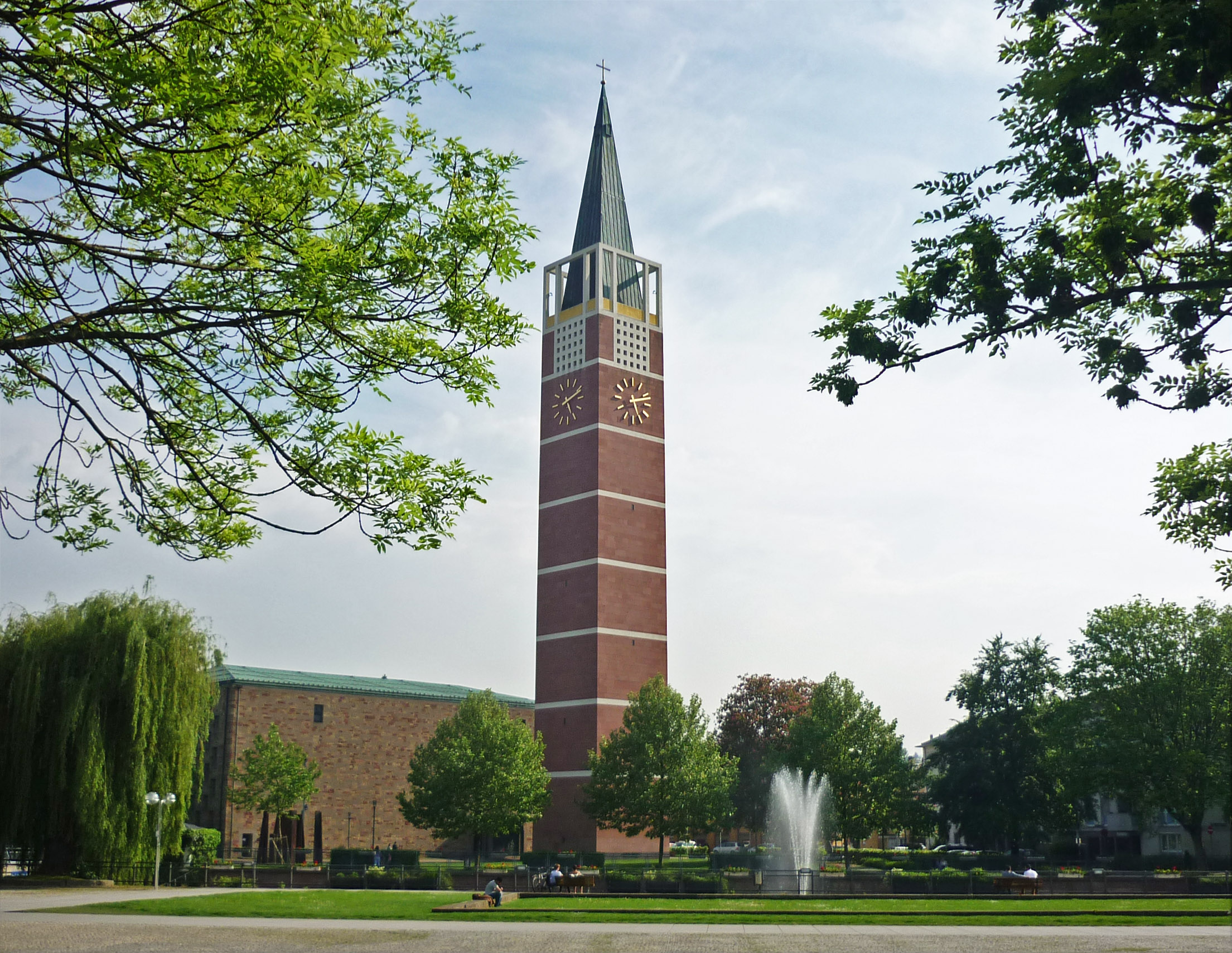 Evang. Stadtkirche in Pforzheim (Württemberg)